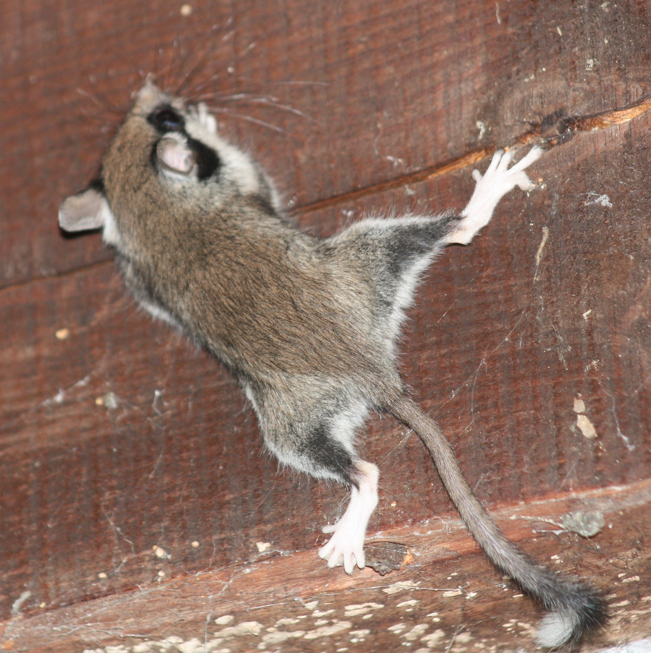 Un lérot dans mon garage